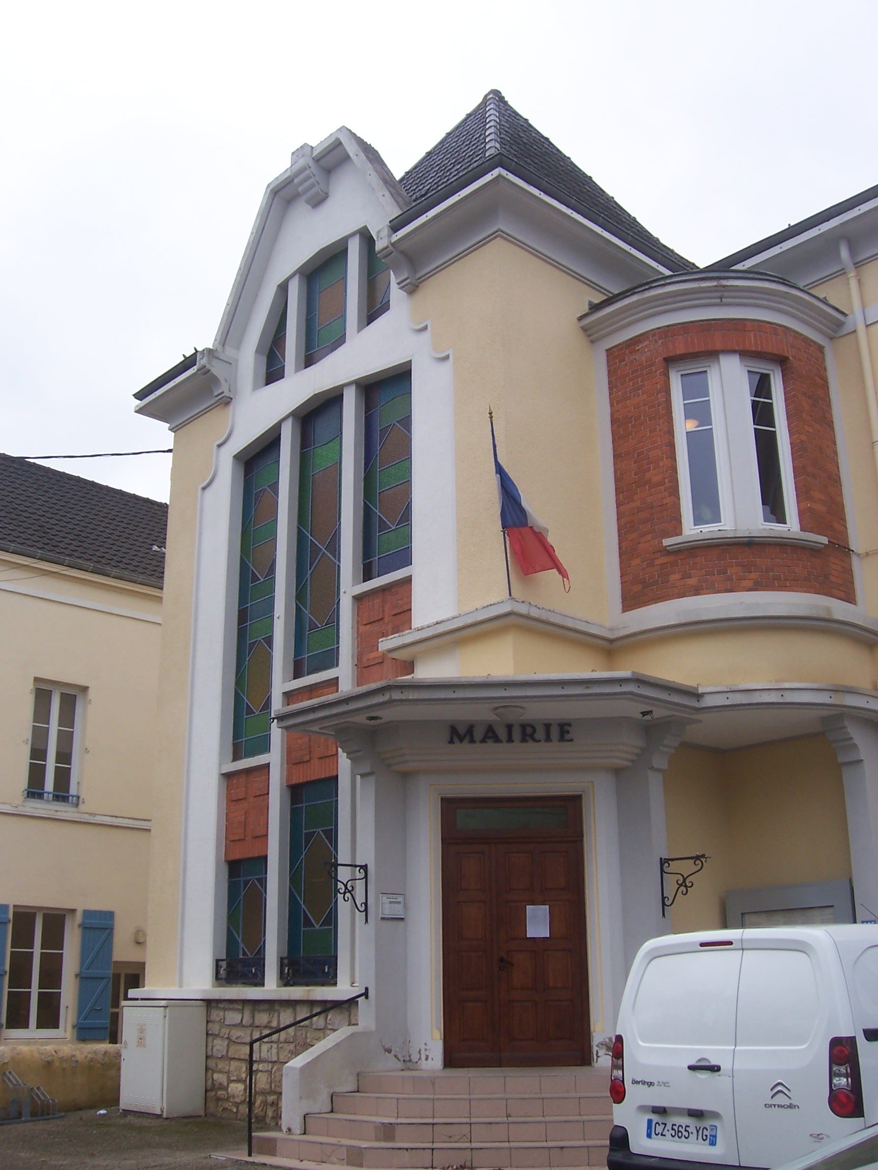 Mairie de Branges